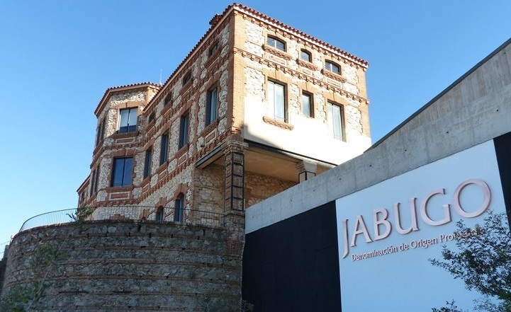 Sede de la DOP Jabugo ("Edificio El Tiro")